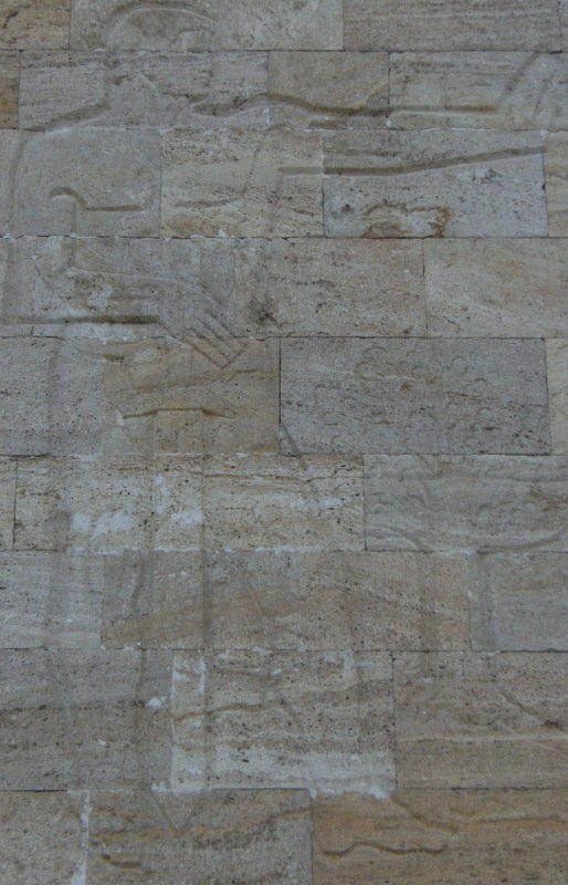 Anıtkabir rölyefi